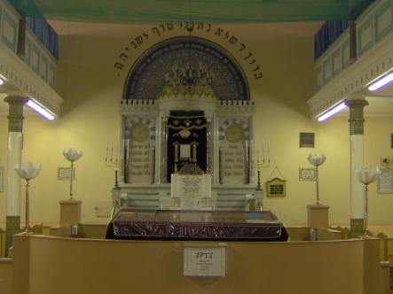 Autor: Maks Saczywko; Data wykonania: 7 sierpnia 2006; Obiekt: Synagoga w Rydze (Łotwa)